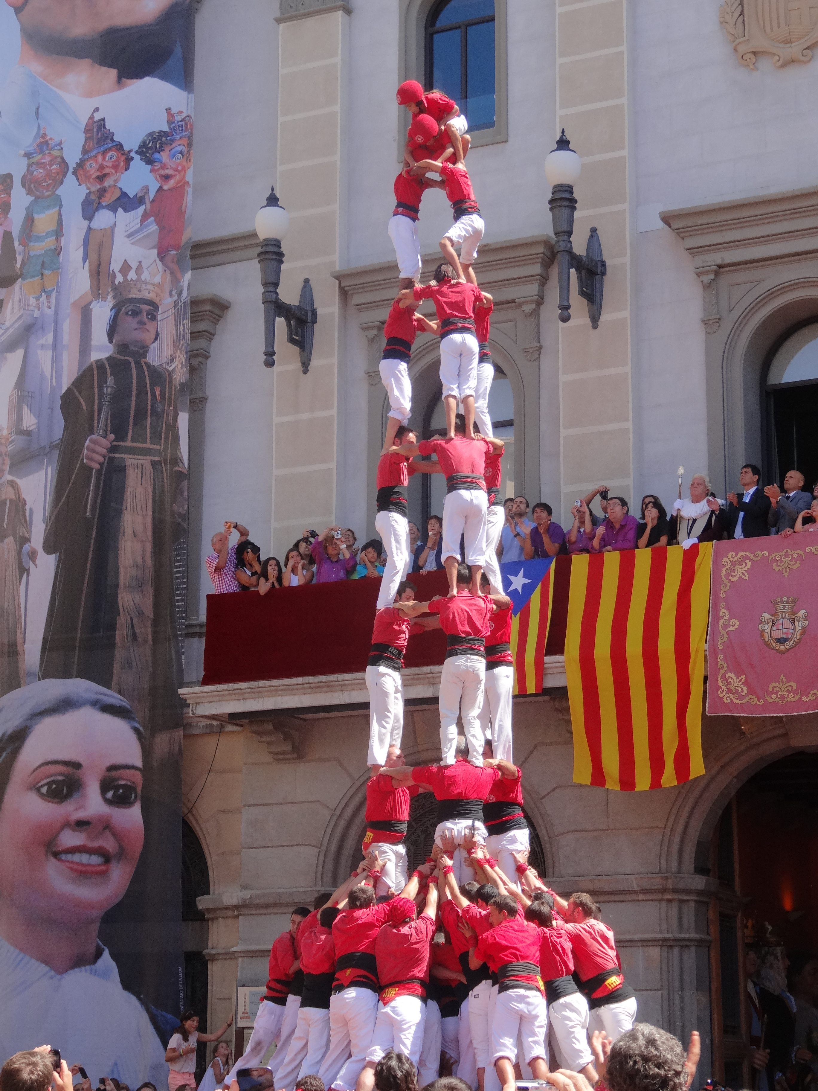 Actuació castellera de la Festa Major Major d'Igualada 2013, a la plaça de l'ajuntament. Colla Joves de Valls 3de9f descarregat